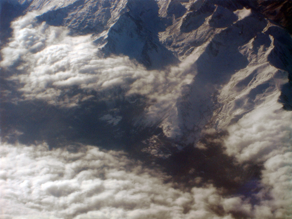 Valle de Tena (Pirineos) aerial view